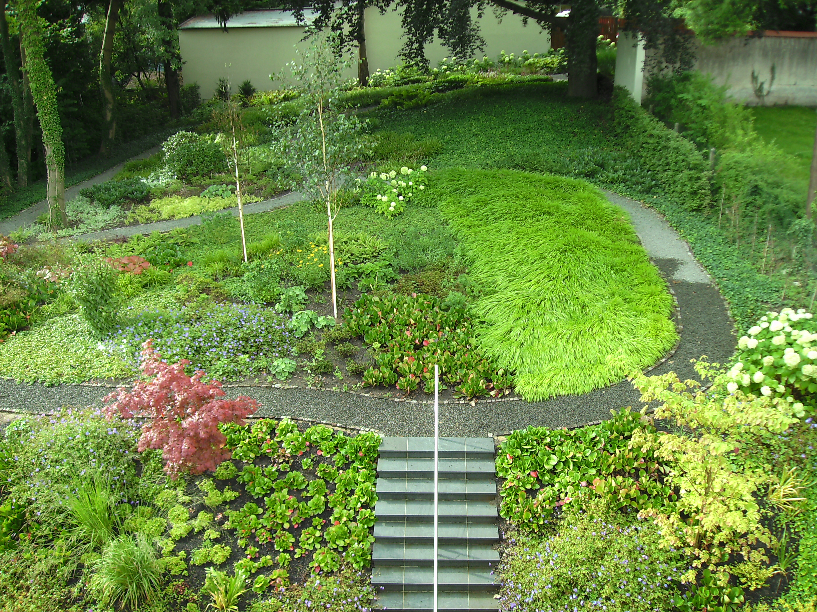 Naturlandstiftung Saar: Gartenanlage am Stiftungssitz Saarbrücken